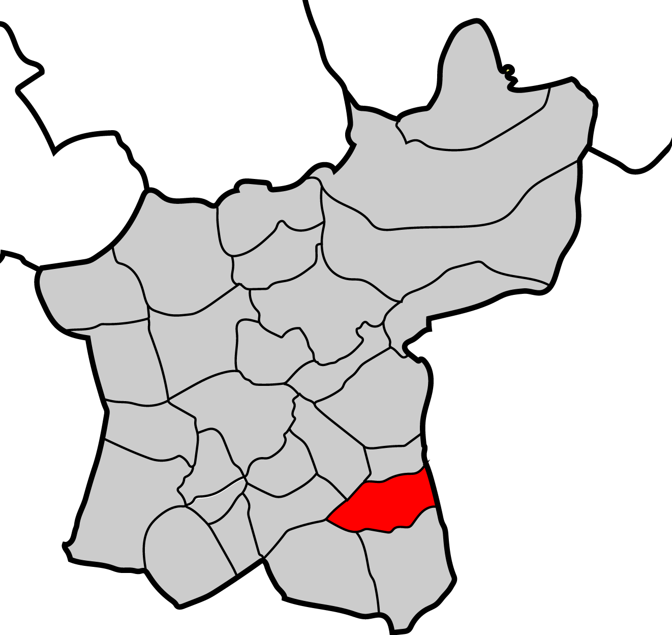 Mapa parroquia de Sixirei Baralla